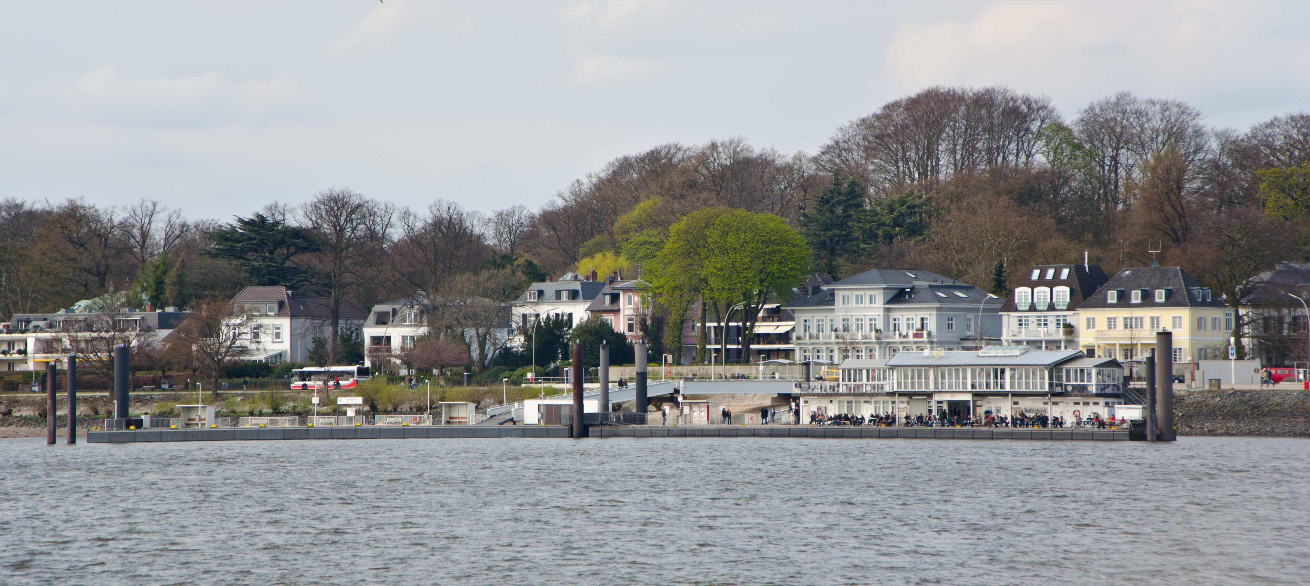 Fähranleger von Teufelsbrück in Hamburg-Othmarschen